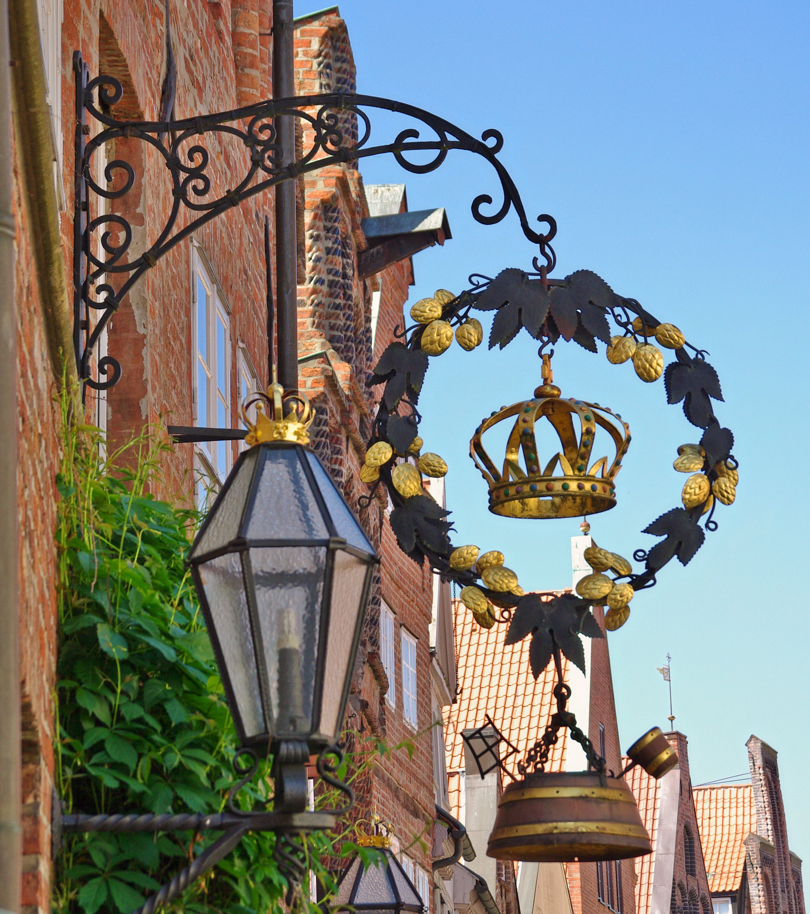 Detailaufnahmen von der Kronenbrauerei in Lüneburg